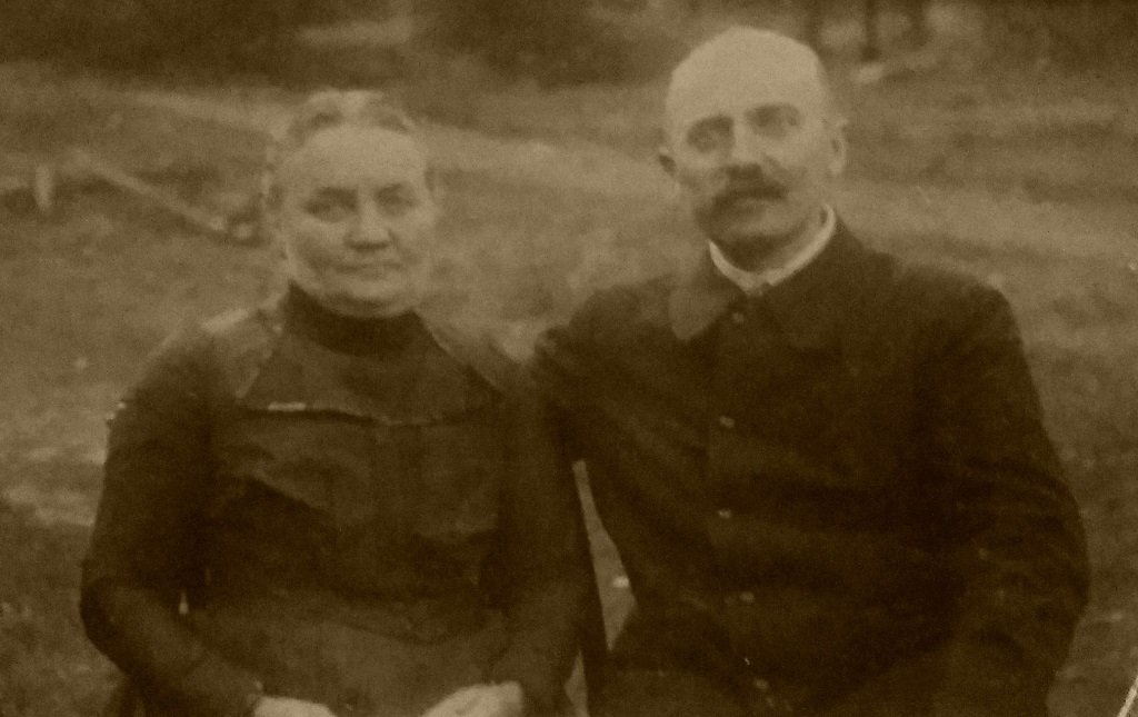 Lux János (1852–1916), a henckói vasgyár gondnoka, és Schönwiesner Amália (1861–1938), akiknek a fia, dr. Lux Gyula (1884–1957) nyelvész, tanügyi főtanácsos, a Magyar Királyi Állami Németnyelvű tanítóképző Liceum alapítója és igazgatója